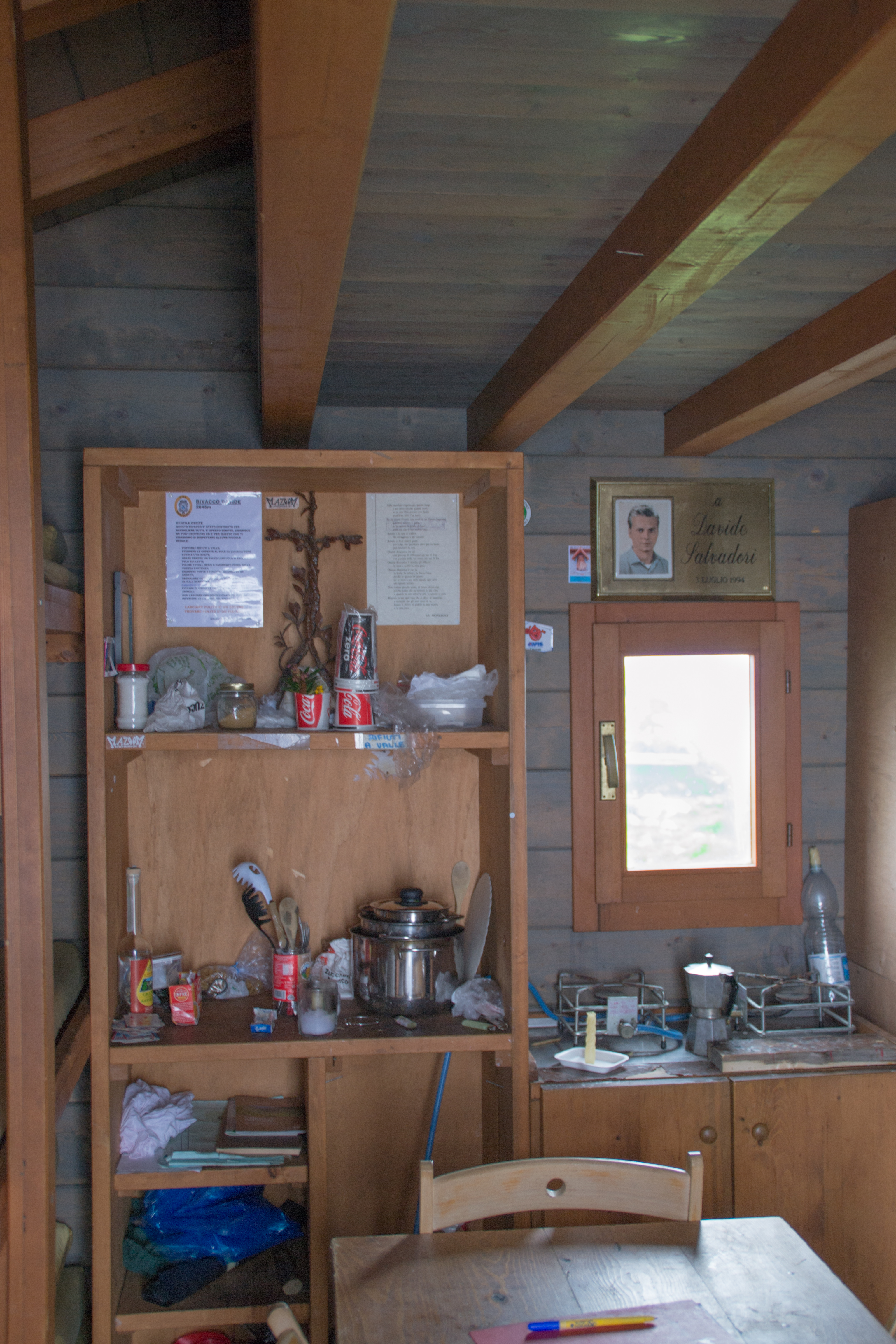 piano cottura e ripostiglio del bivacco davide salvadori